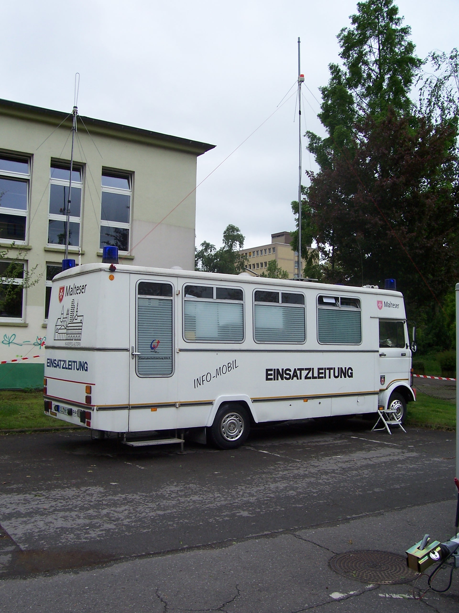 Einsatzleitwagen 2 der Führungsunterstützung des Malteser Hilfsdienstes aus Kaiserslautern